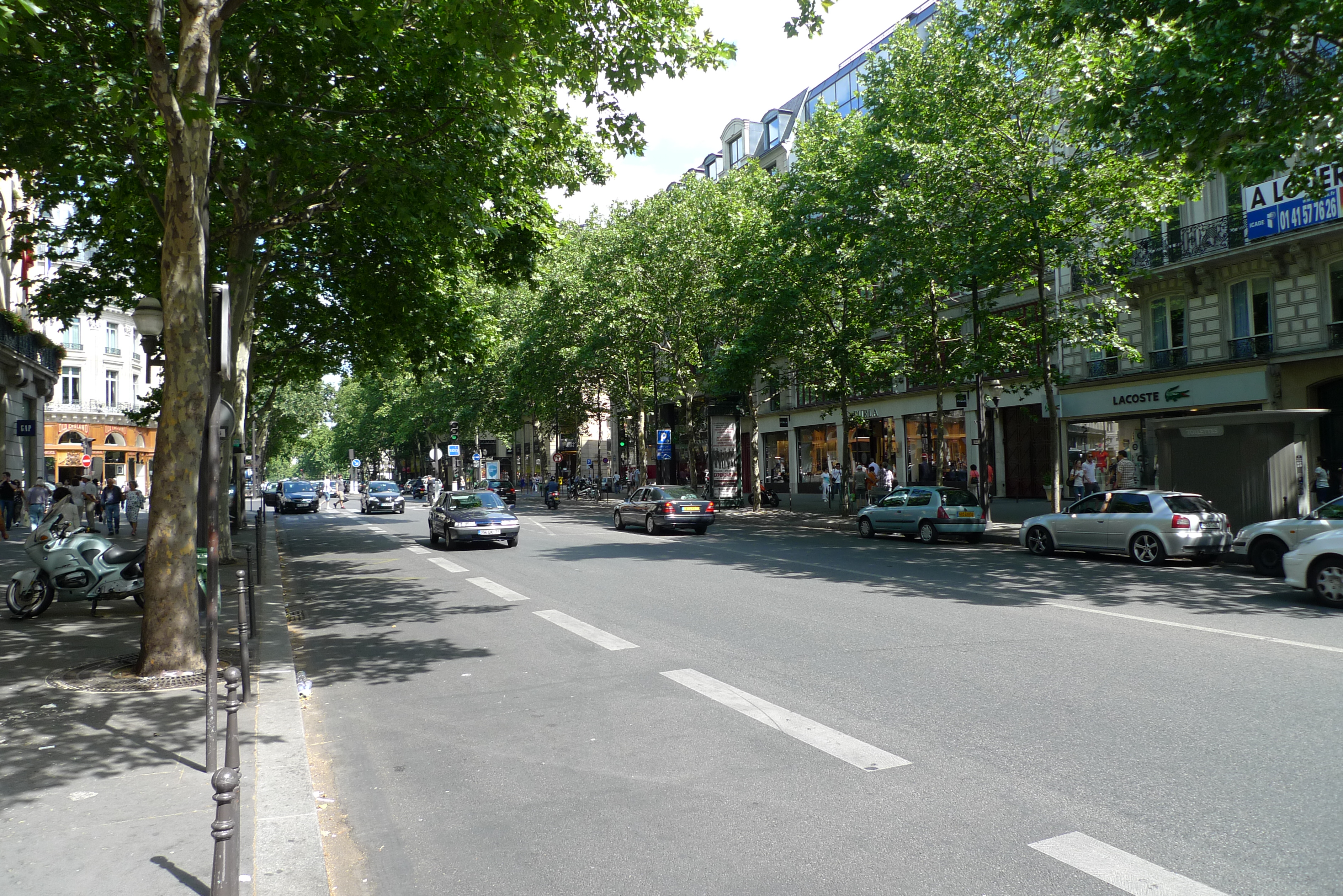 Boulevard des Capucines, Paris.